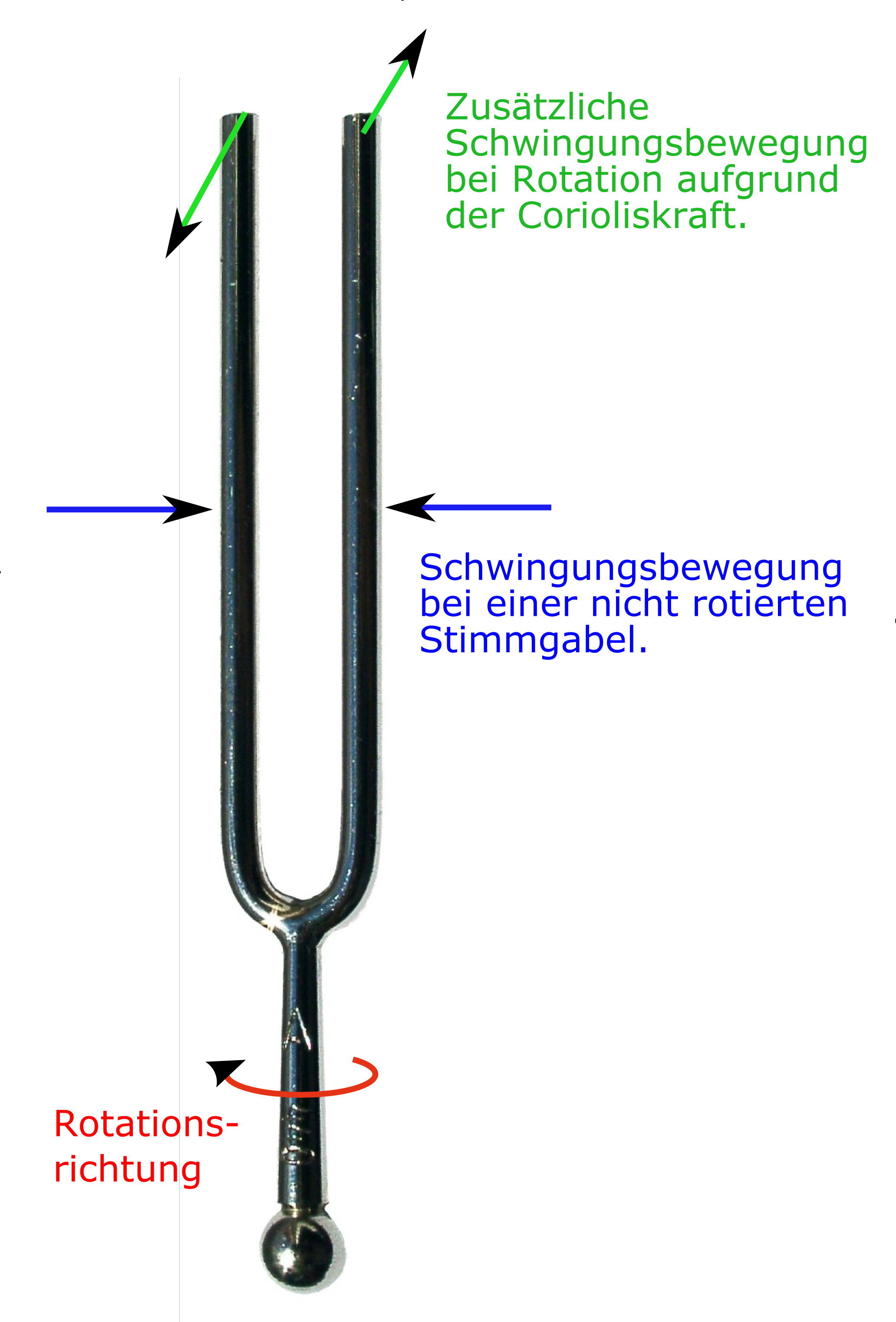 Corioliskraft bei gedrehter Stimmgabel zur Erläuterung der Funktion des Drehratensensors.